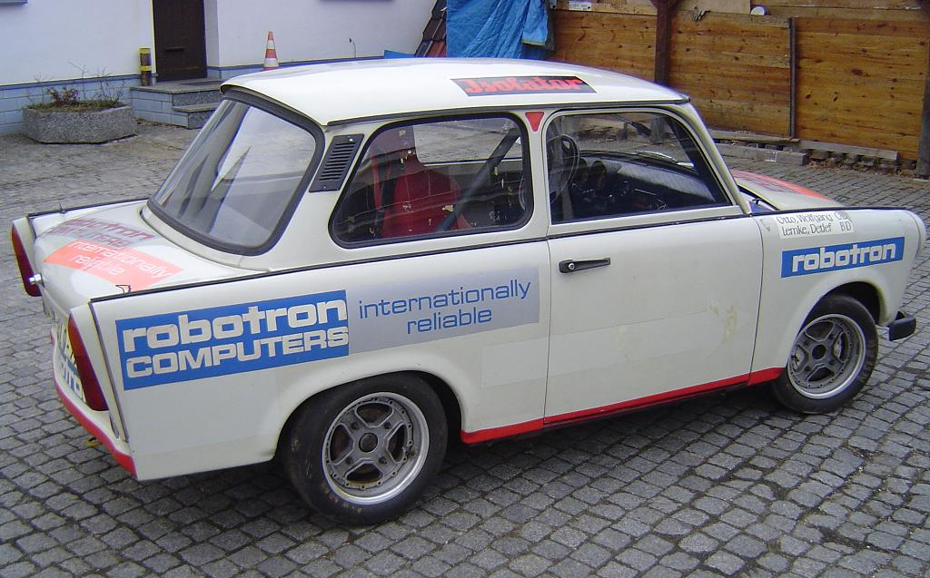 Trabant 601R